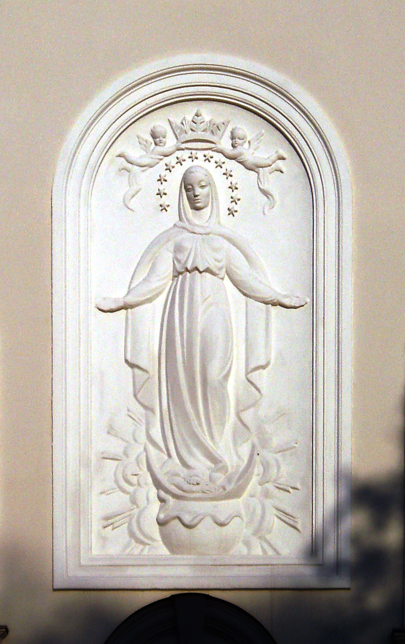 Рельєф Богоматері на фасаді колишнього костелу францисканців у Львові